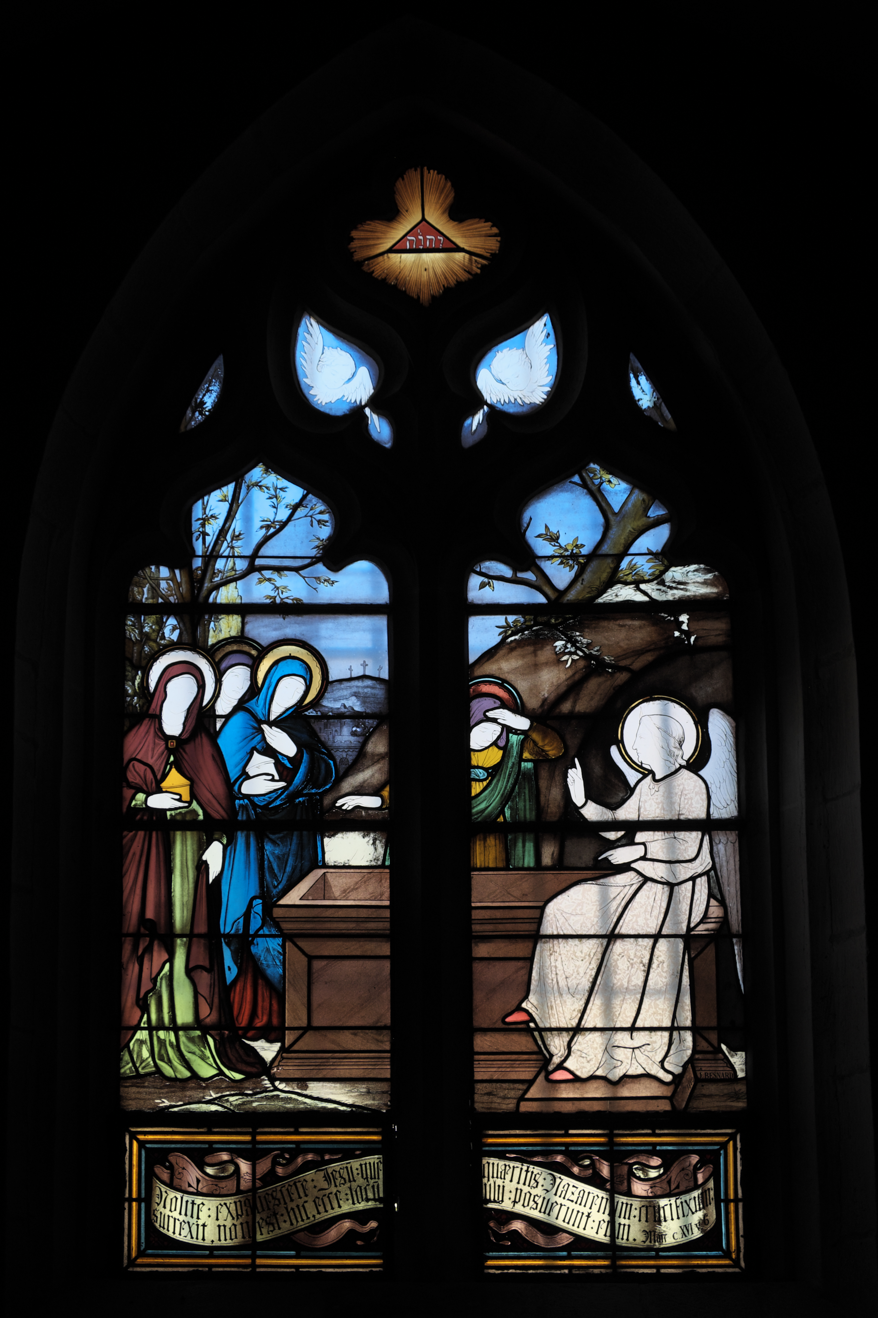 Katholische Kirche Notre-Dame-de-l’Assomption in Puligny-Montrachet im Département Côte-d’Or (Bourgogne-Franche-Comté/Frankreich); Bleiglasfenster mit der Signatur: J. BESNARD 1880; Darstellung: Frauen am leeren Grab